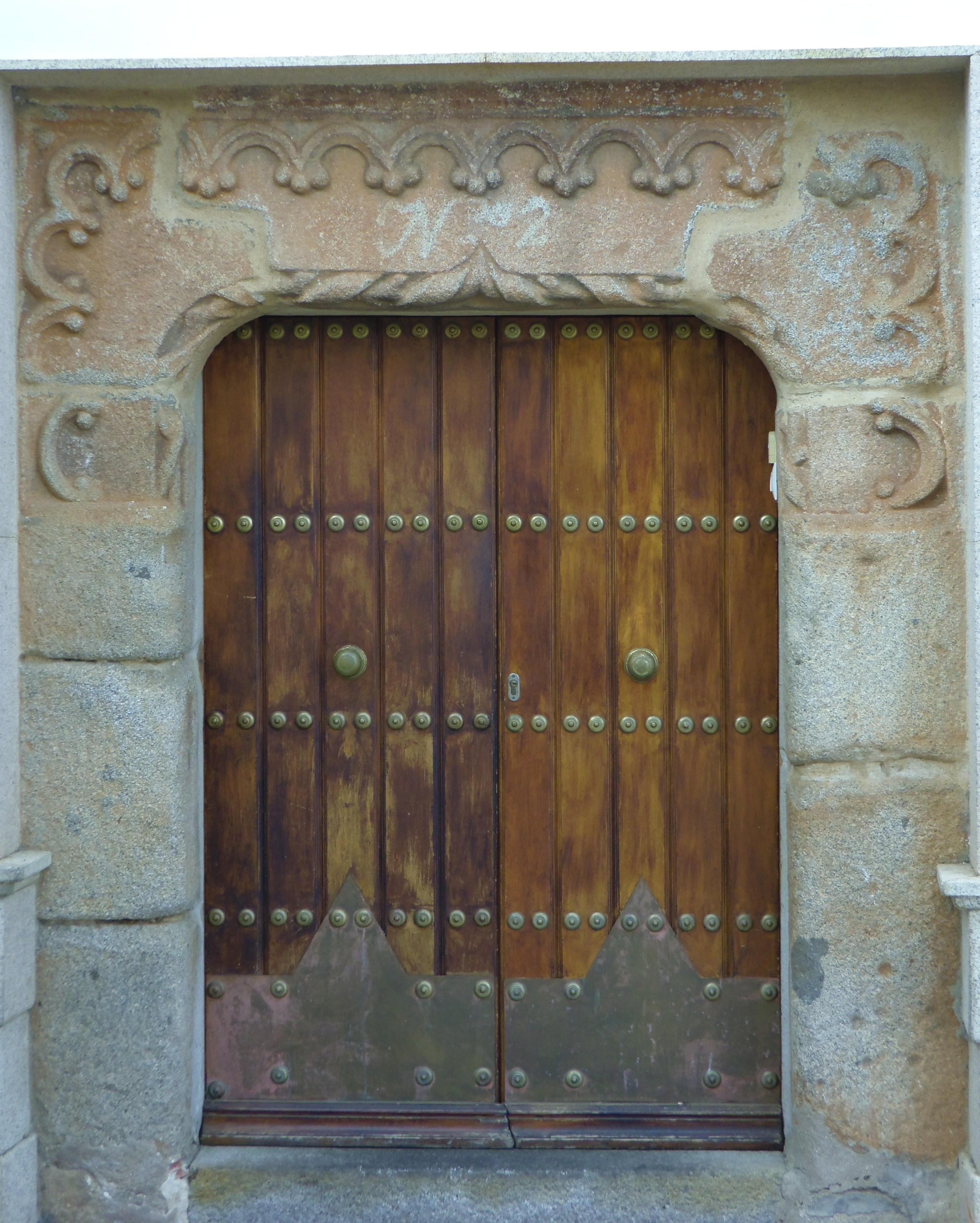 La portada de la casa llamada "del Cordón" situada en frente de la iglesia parroquial de Monterrubio de la Serena (Badajoz).